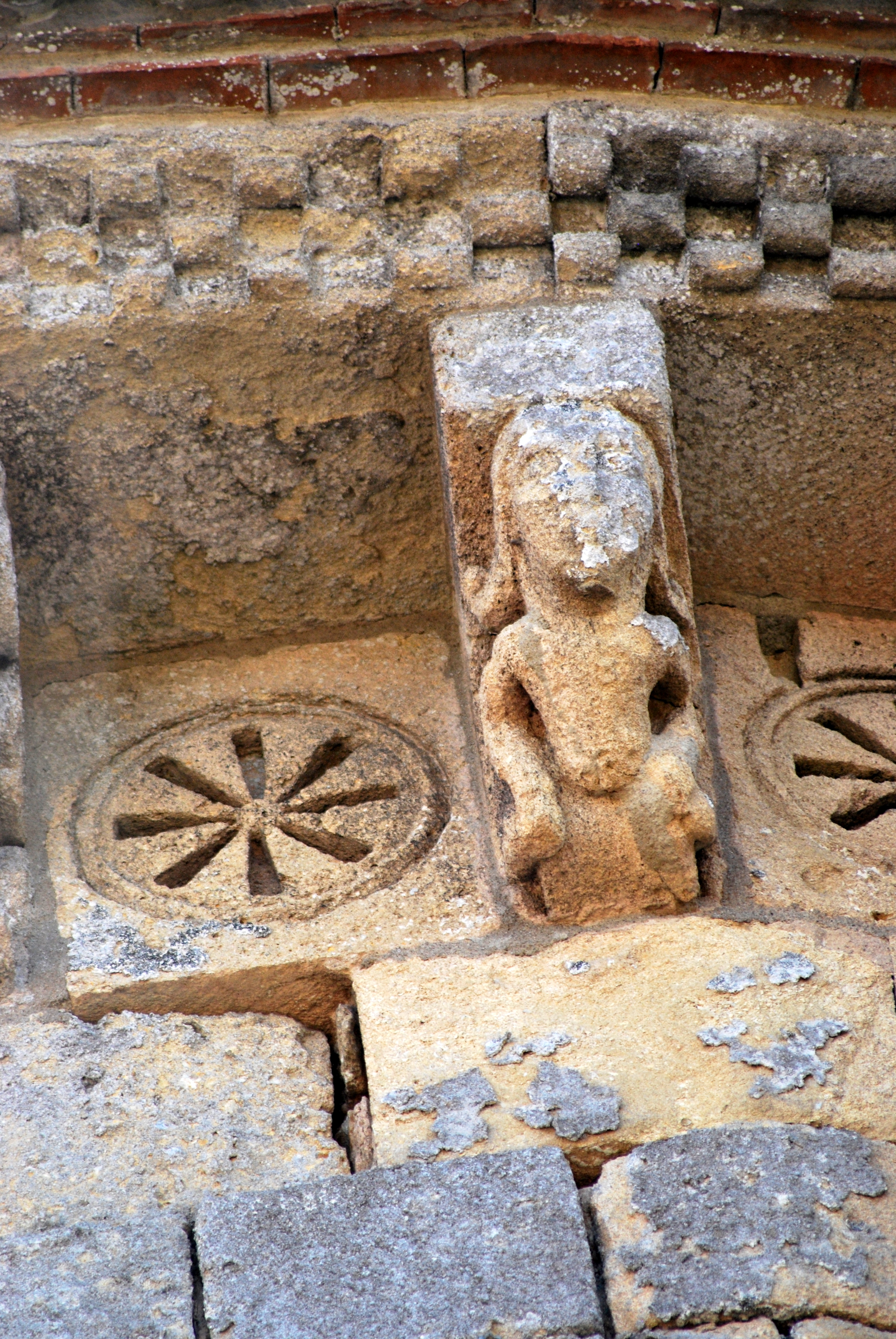 Saint-Macaire église Saint-Sauveur